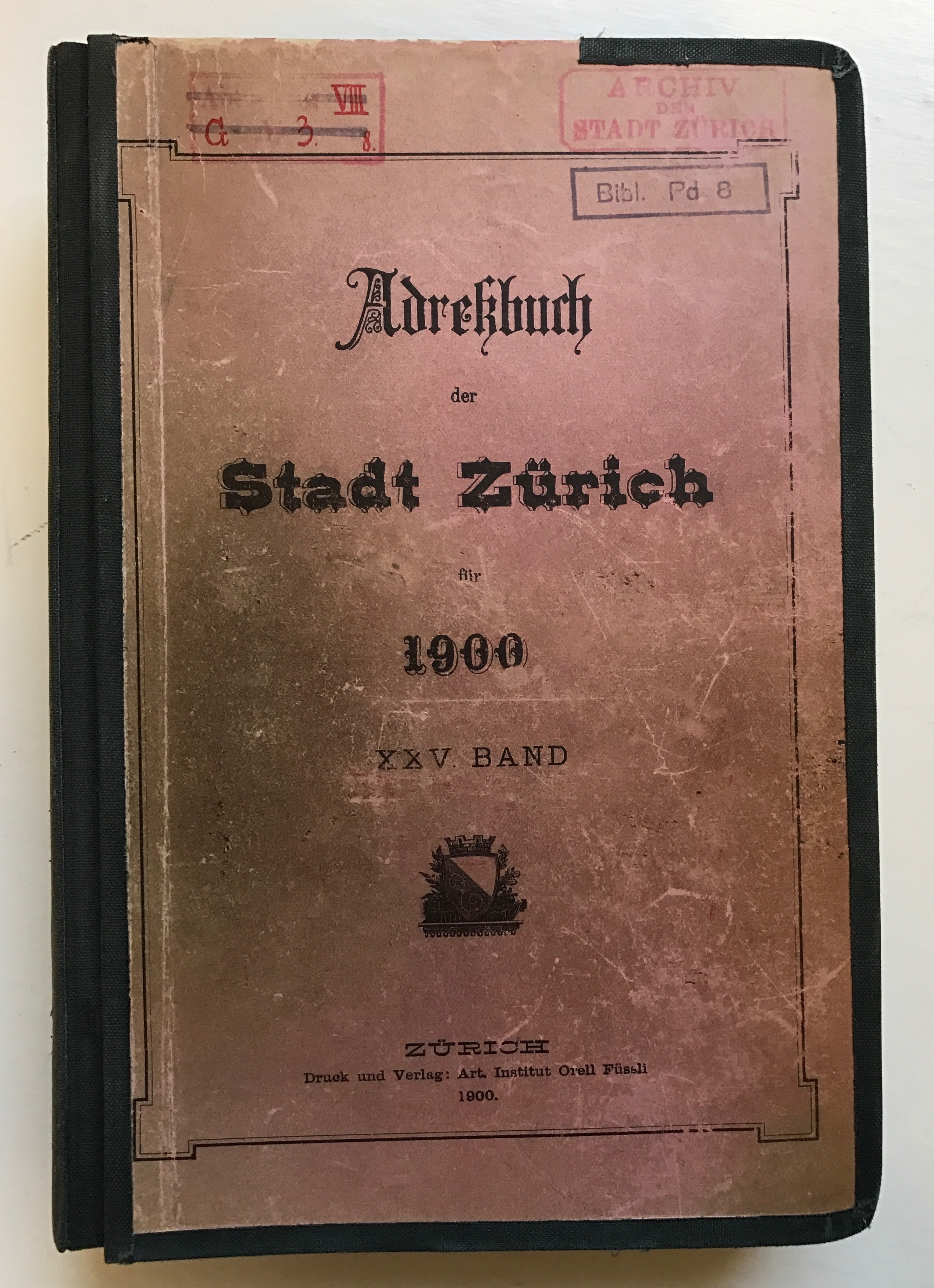 Adressbuch der Satdt Zürich, 1900